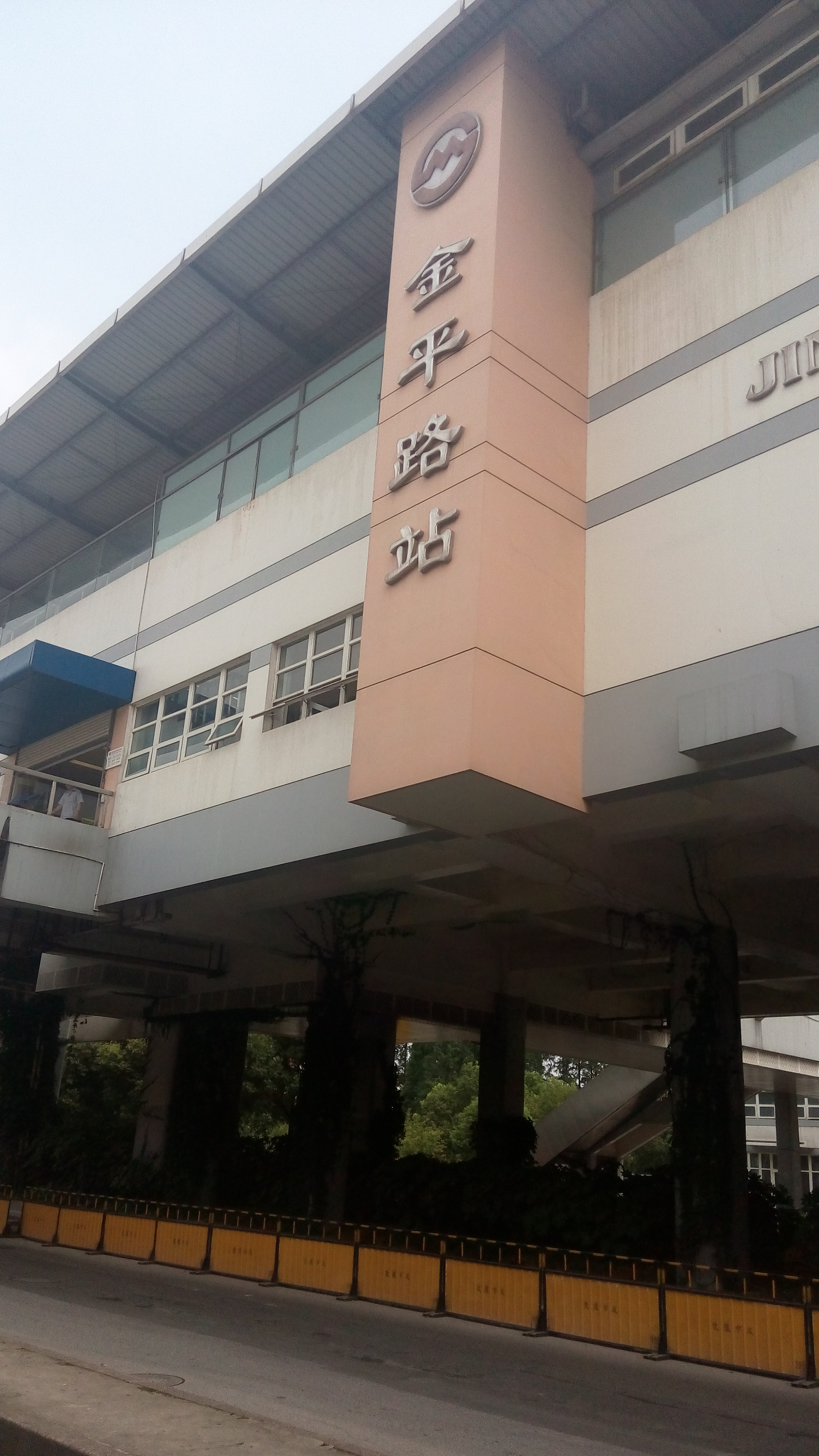 金平路站 站房